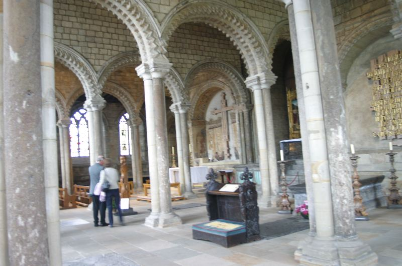 Durhamkatedralen, Galilee-kapellet.